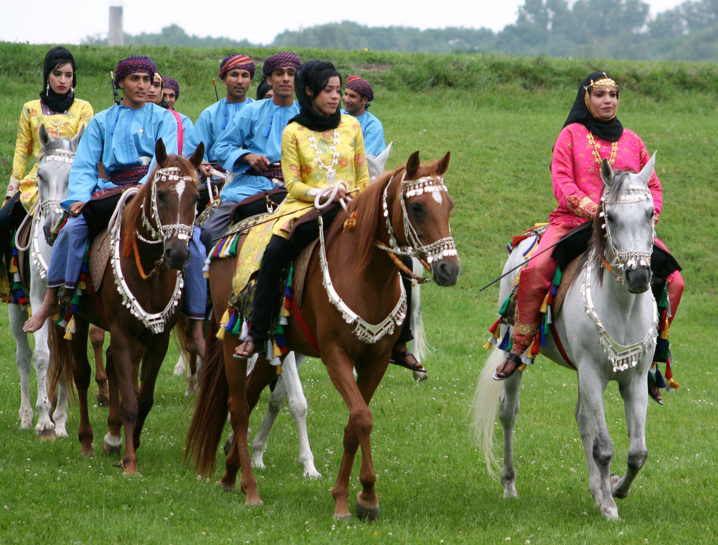 Royal Cacalry of Oman auf der Pferd International 2011 in München.